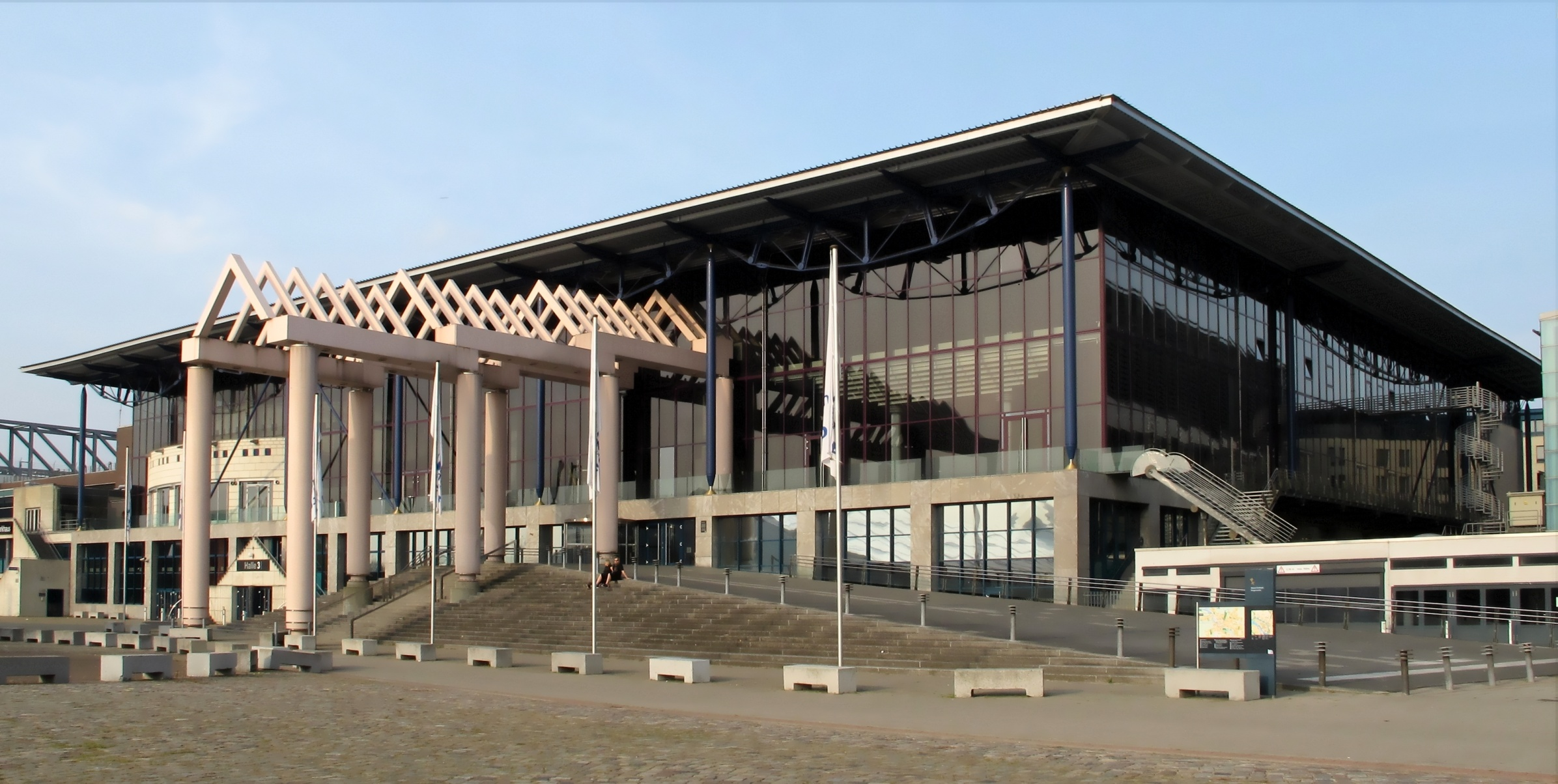 Bremen, Congress Centrum Bremen, Messehallen 2 und 3, Ansicht Bürgerweide